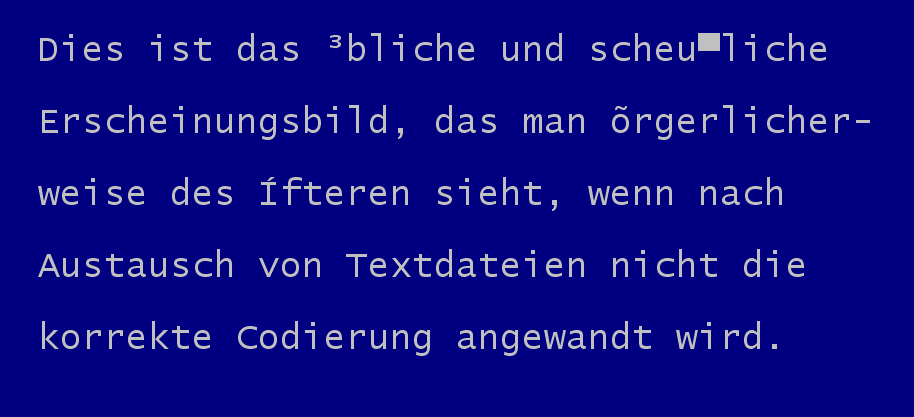 Falsche Darstellung der deutschen Umlaute durch Verwendung unterschiedlicher Codierungen. Der Text lautet: „Dies ist das ³bliche und scheu■liche Erscheinungsbild, das man õrgerlicherweise des Ífteren sieht, wenn nach Austausch von Textdateien nicht die korrekte Codierung angewandt wird.“ Der Text würde richtig kodiert lauten: „Dies ist das übliche und scheußliche Erscheinungsbild, das man ärgerlichweise des Öfteren sieht, wenn nach Austausch von Textdateien nicht die korrekte Codierung angewandt wird.“